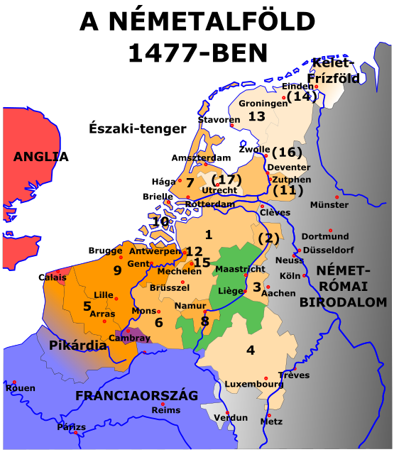 Az svg png változatban, mert egyébként rossz.